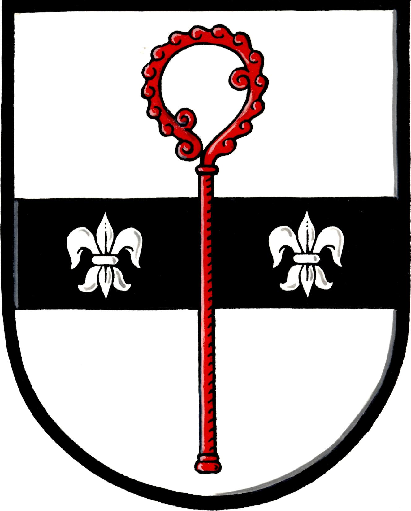 Znak obce Opatovice I